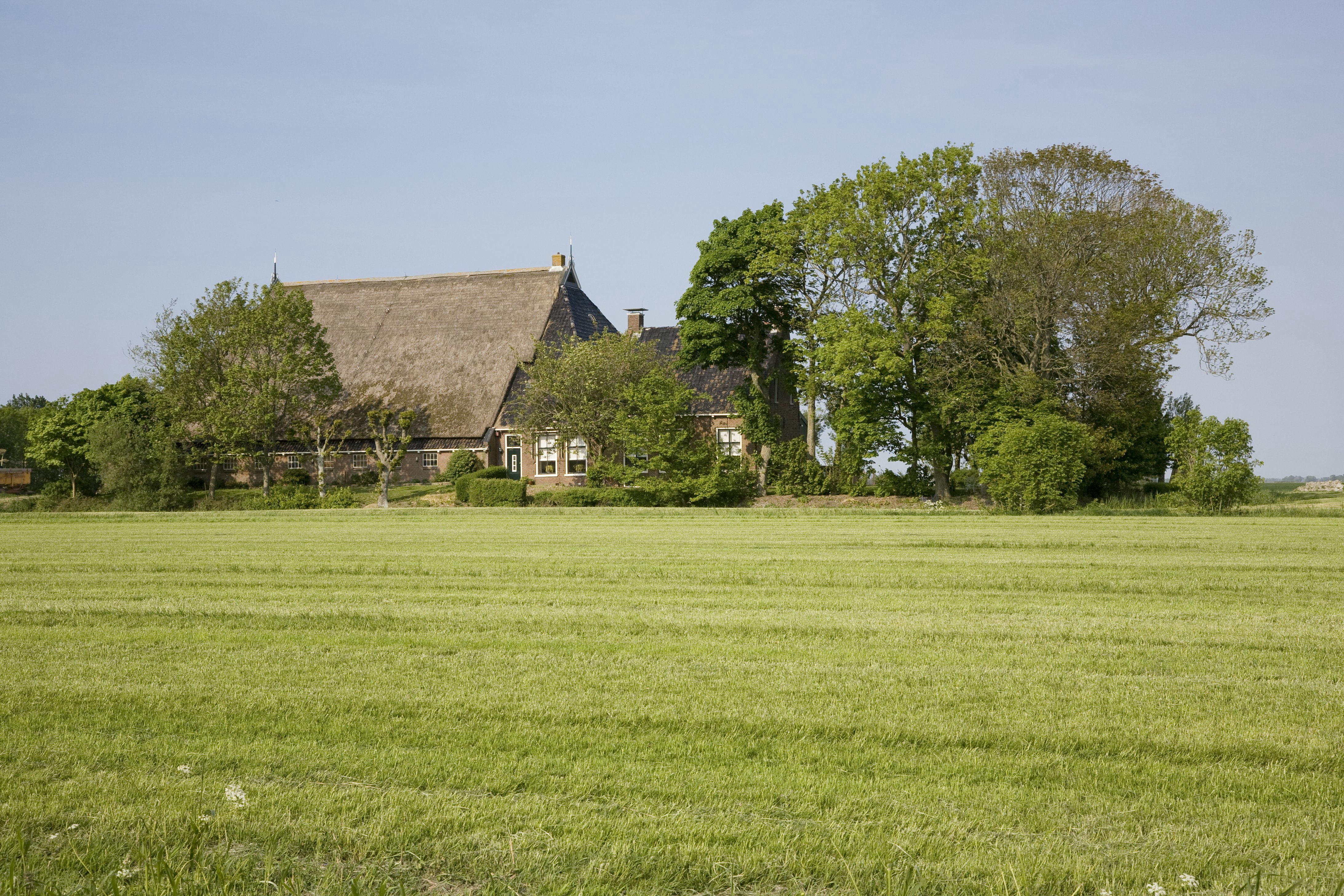 Boerderij Popta State: Overzicht van de ligging van de boerderij in het weiland (opmerking: Project RRWR)